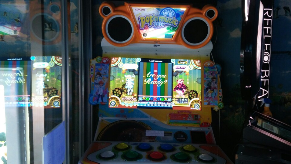 조선말: 팝픈뮤직 19 TUNE STREET 부터 나오는 신기체